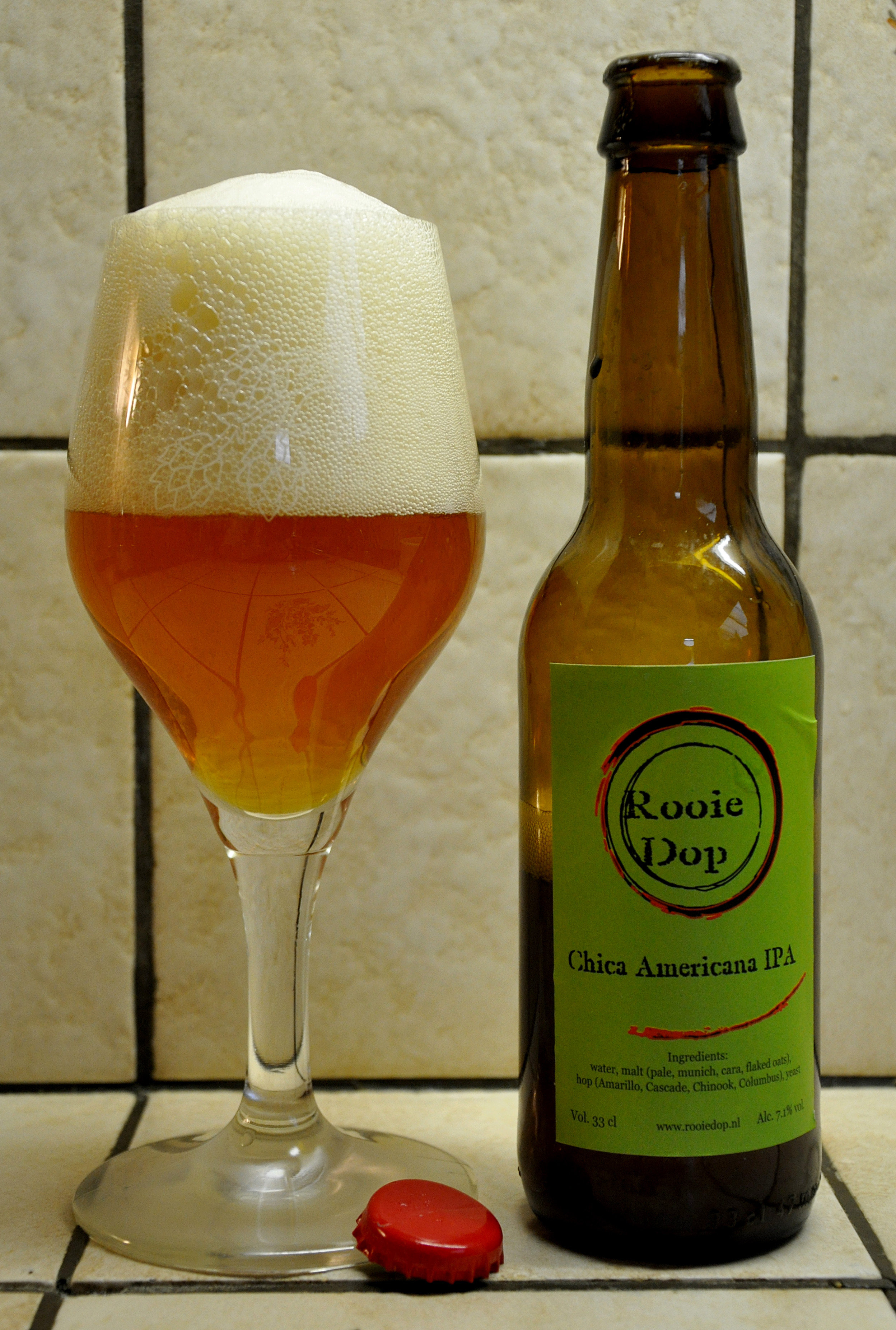 Rooie Dop Chica Americana IPA